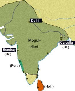 Indien, karta, Mogulriket 1690, egentillv.